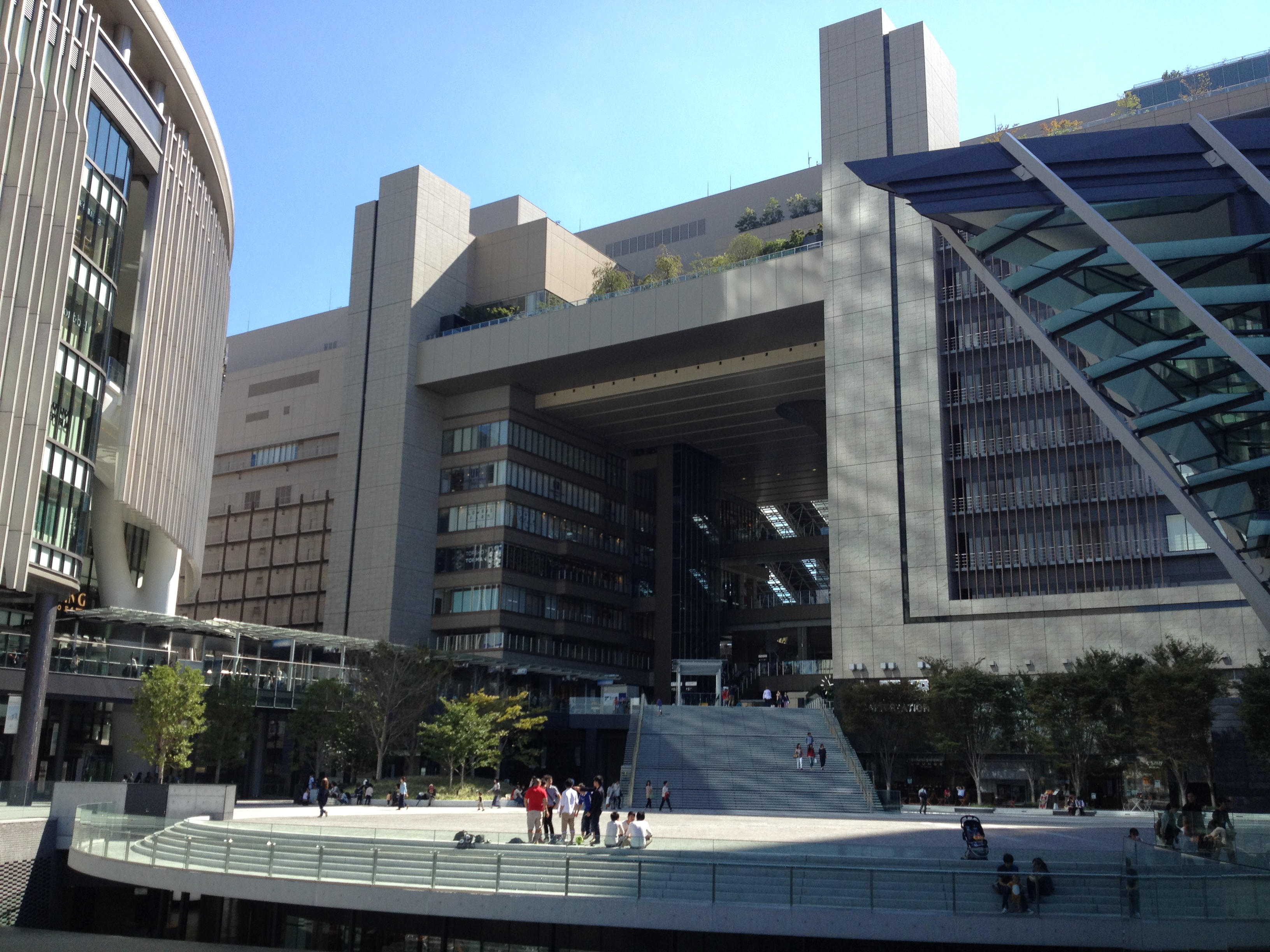 大阪駅アトリウム出口とうめきた広場